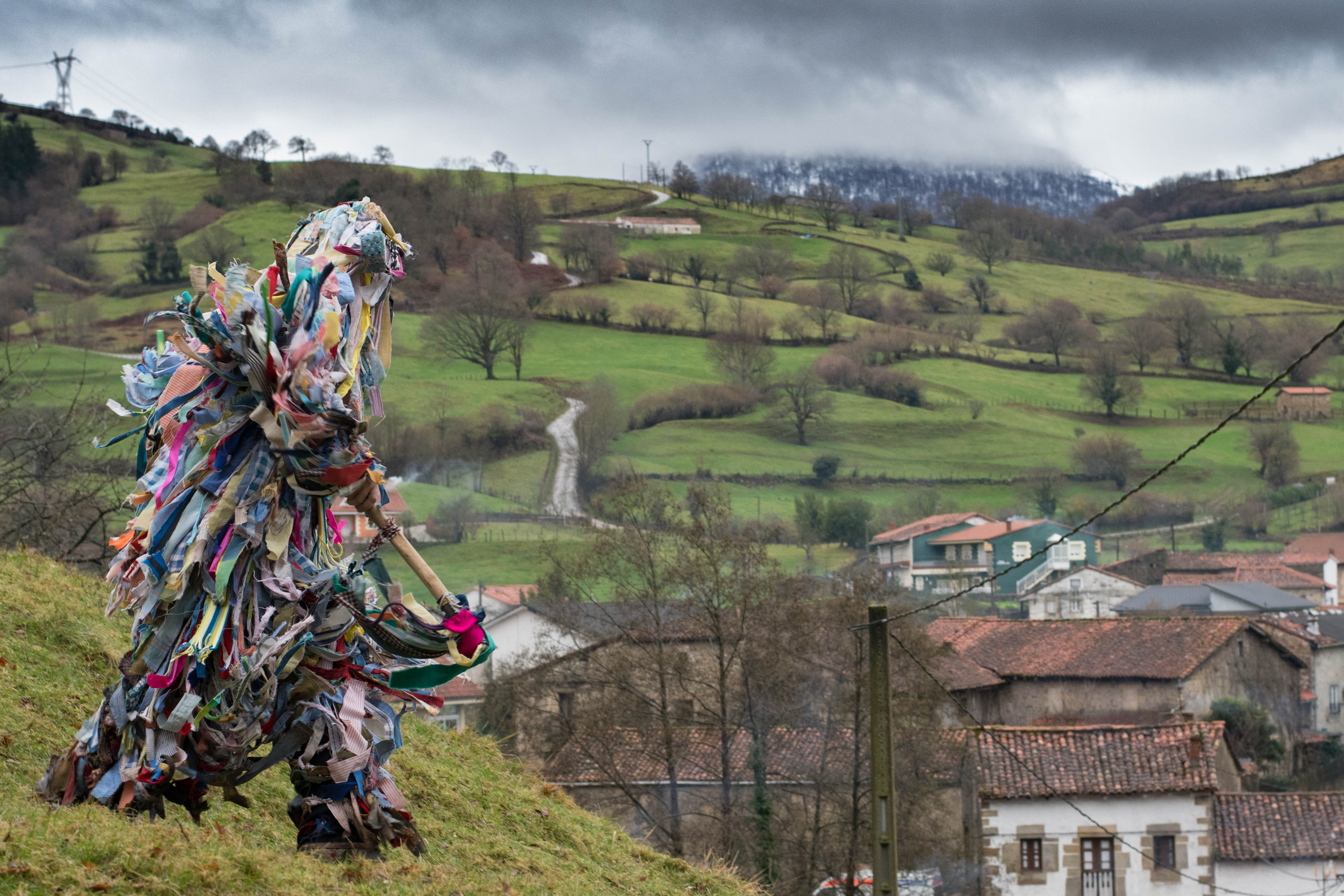 Mascarada en Silio, Cantabria, España. Primer domingo del año. This is a photography of a Folklore festival in Spain (Wikidata id Q648409).